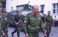 генерал-лейтенант Соболев В.И. Беслан, 2004 год